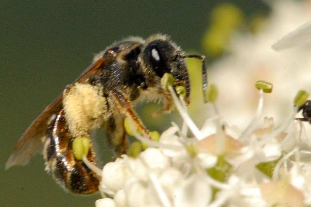 Lasioglossum leucozonium female